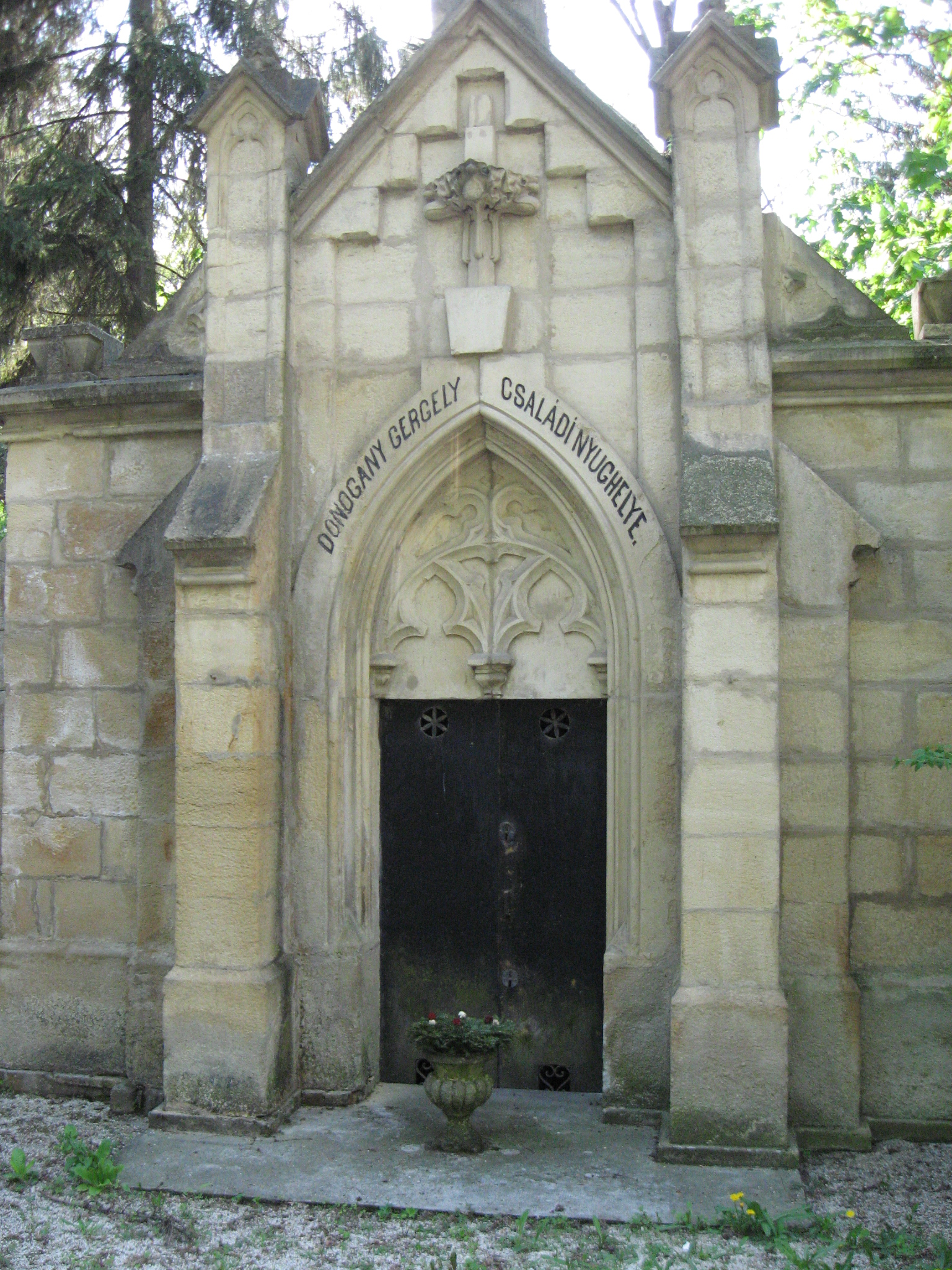 Donogány kripta a kolozsvári Házsongárdi temetőben. 002